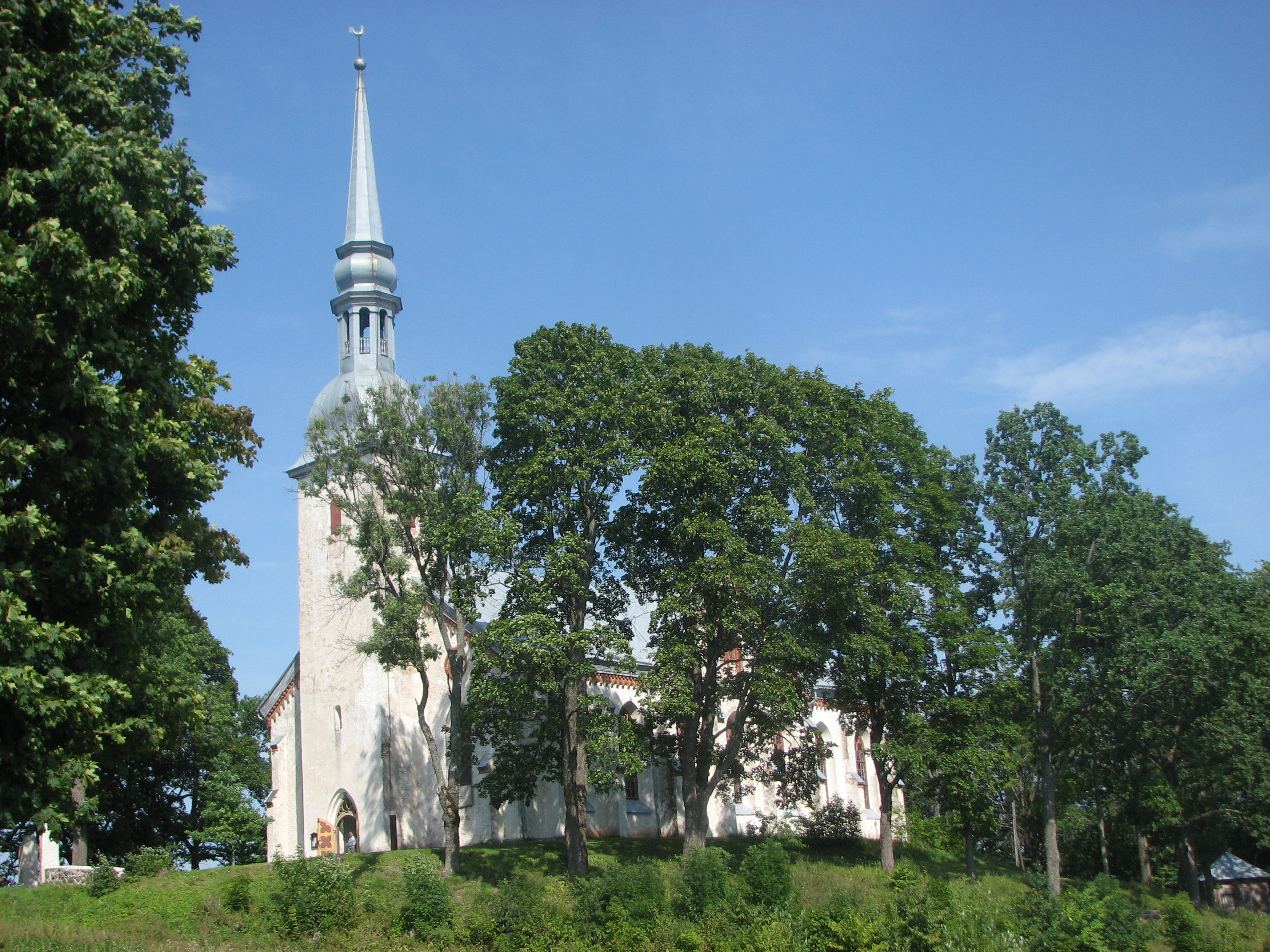 Otepää Church in Otepää, Estonia